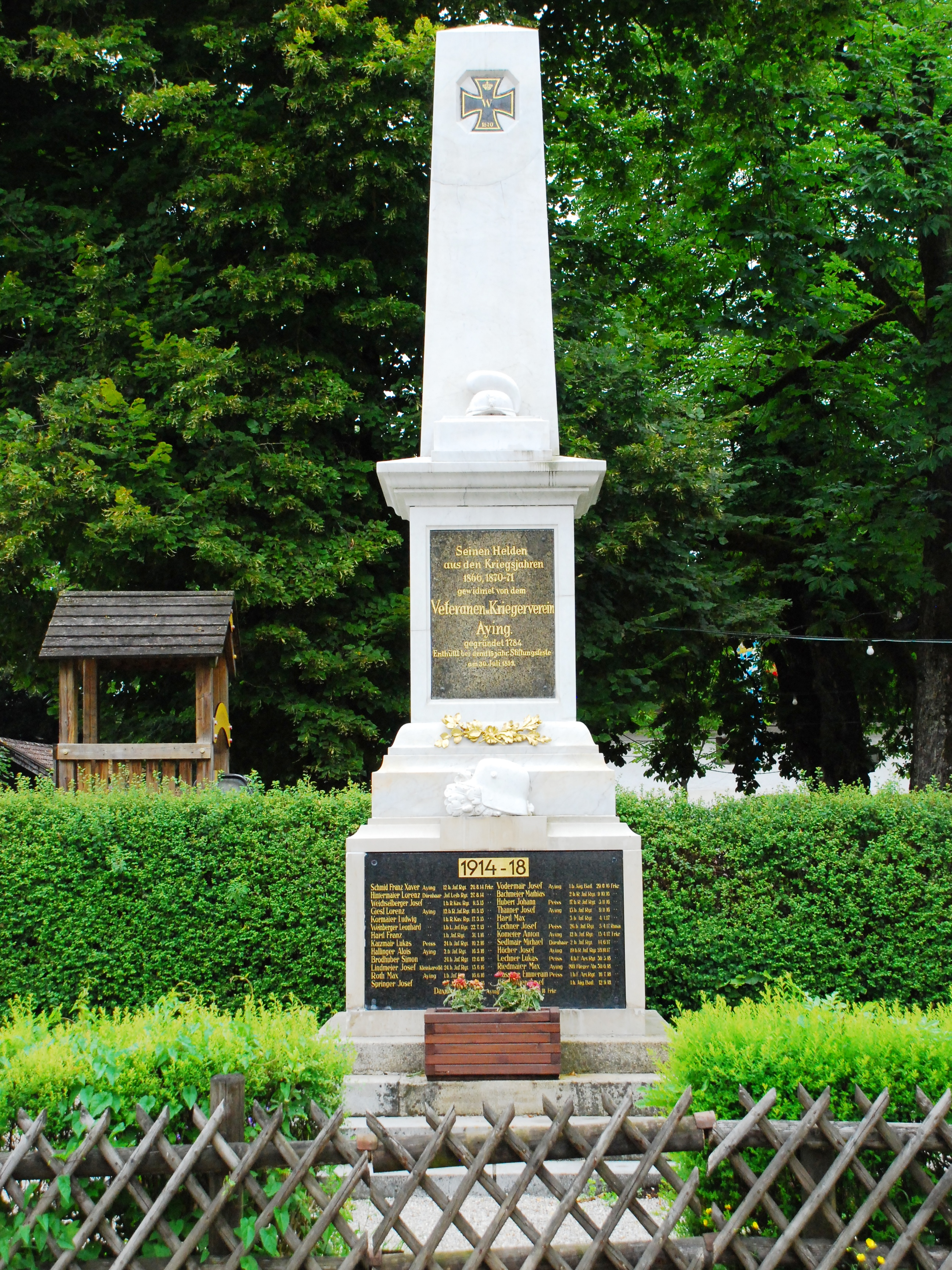 Kriegerdenkmal an der Münchner Straße in Aying, Landkreis München, Bezirk Oberbayern, Bayern. Als Baudenkmal in der Bayerischen Denkmalliste unter Aktennummer D-1-84-137-4 aufgeführt. Laut Denkmalliste im Jahr 1899 errichtet.